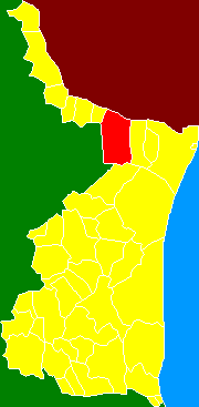 Ñocalización del Municipio de Reynosa en Tamaulipas